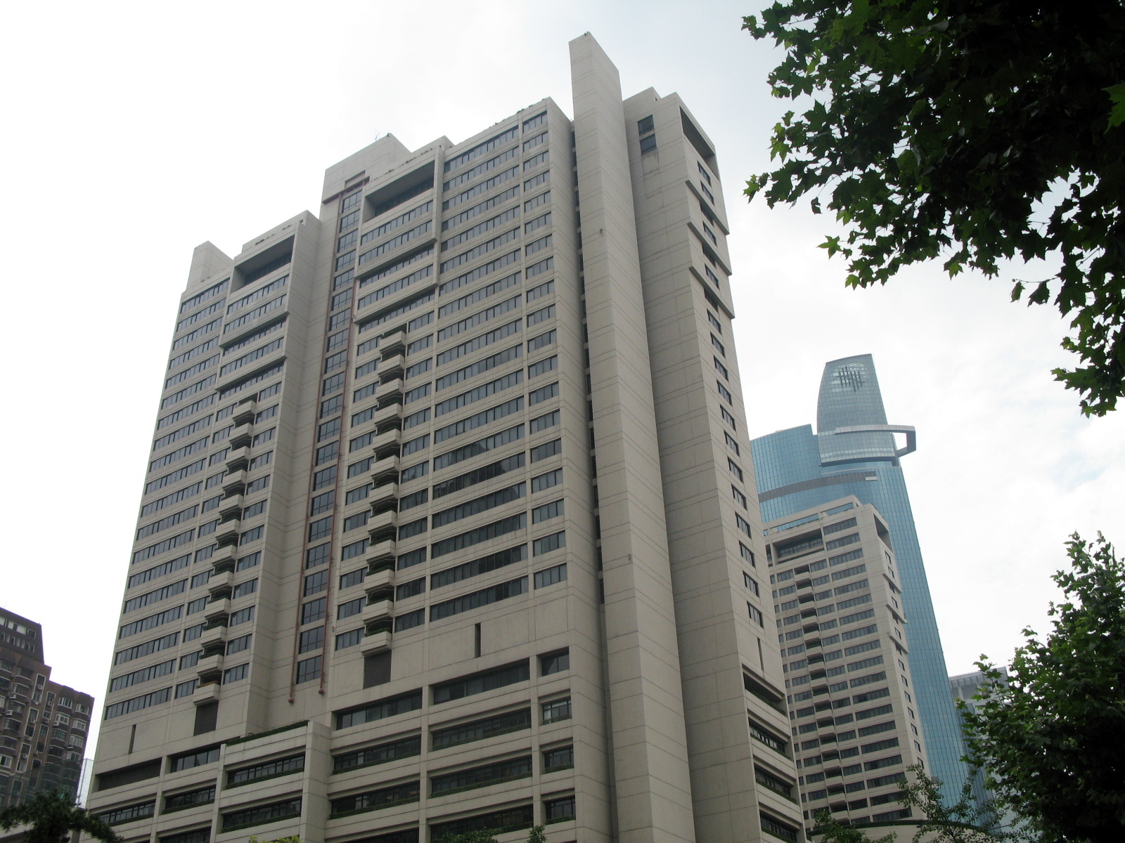 上海商城 Shanghai Centre